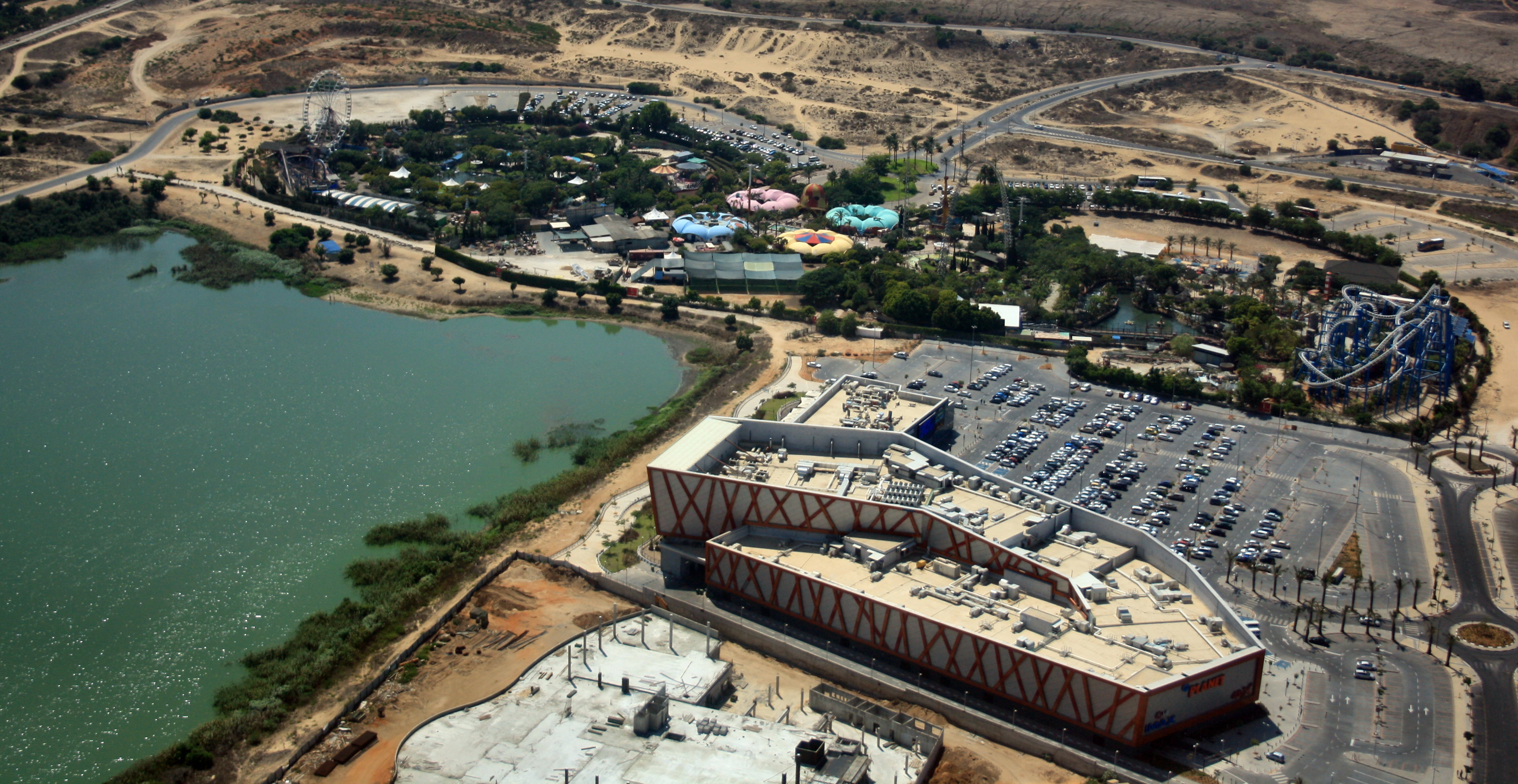 יס פלאנט, הסופרלנד ואגם ראשון במבט מהאוויר.